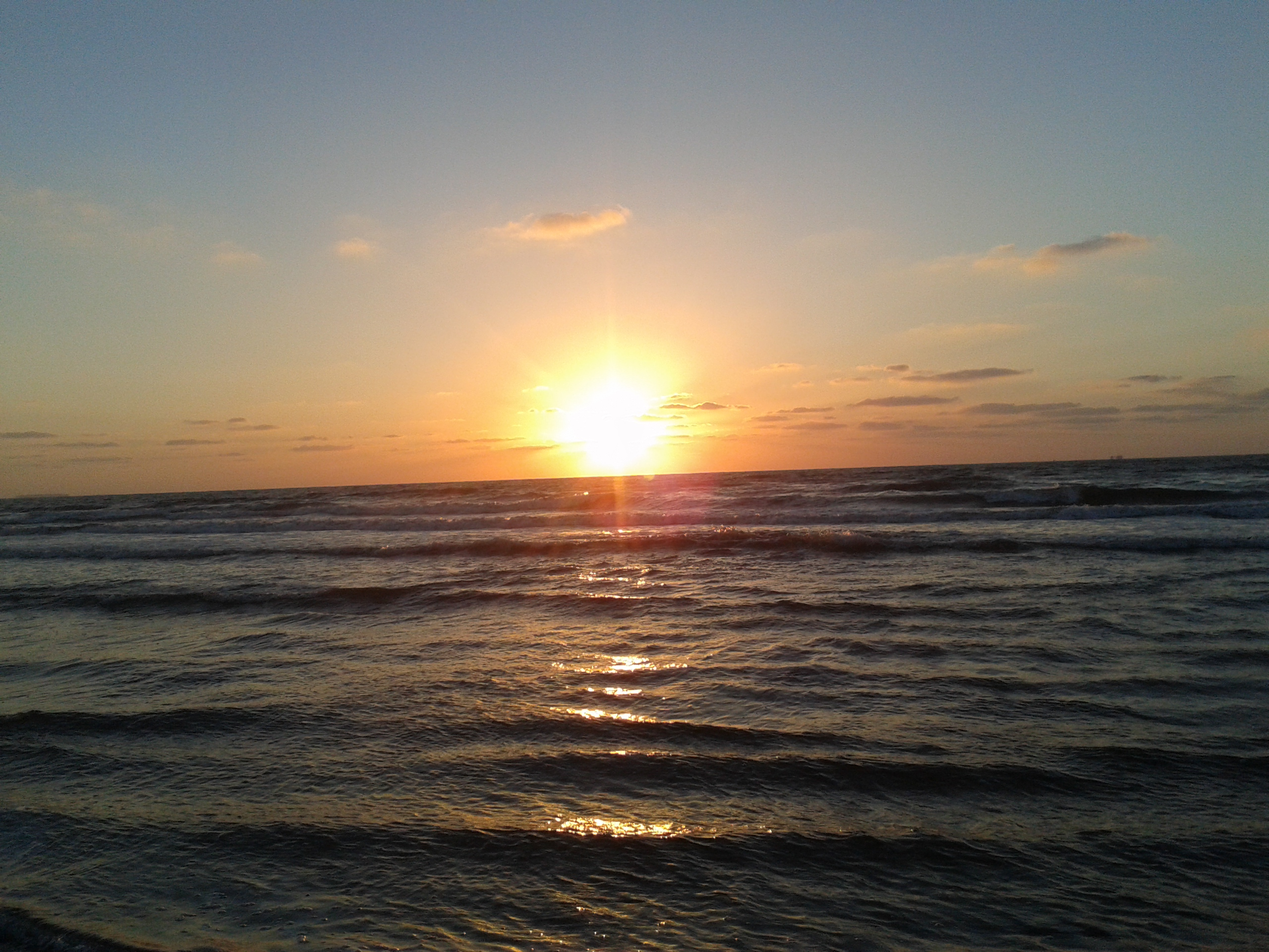 بحر إدكو